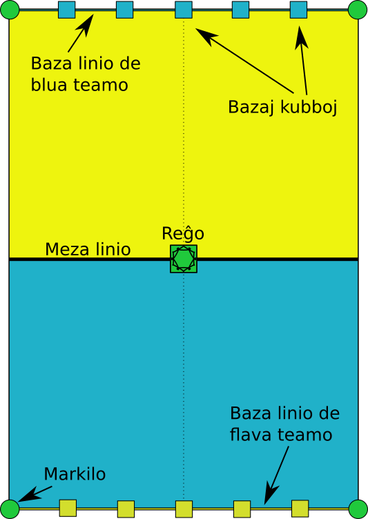 Tiel oni dismetas la figurojn